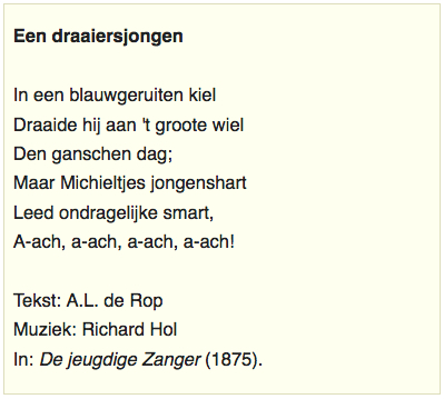 A.L de Rop (1837-1895) en Richard Hol (1825-1904), tekst liedje 'In een blauwgeruite kiel' (1875). Michiel de Ruyter. Opgenomen in het liedboek "Kun je nog zingen, zing dan mee" (1906).